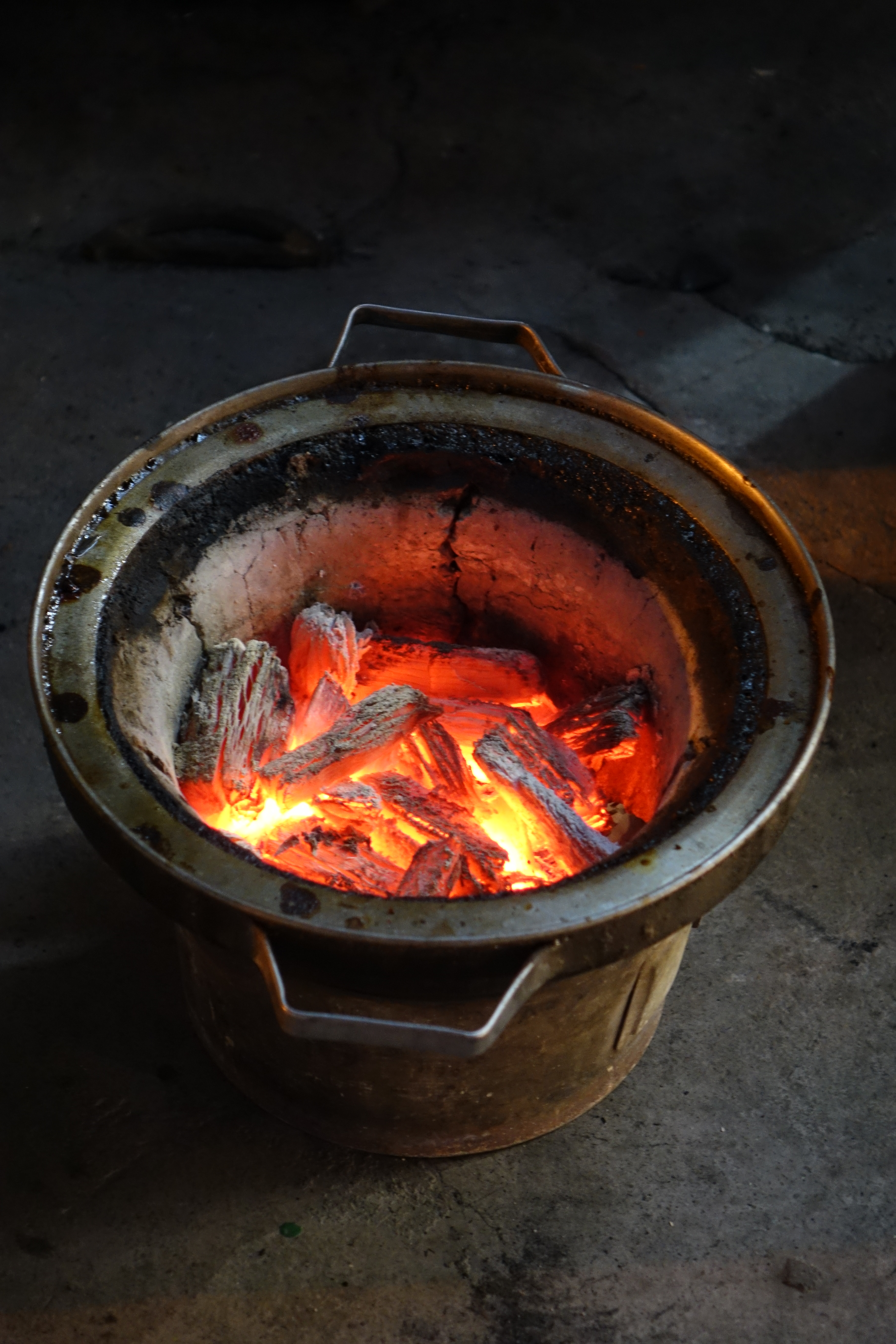 20150209-20150214최광모 촬영